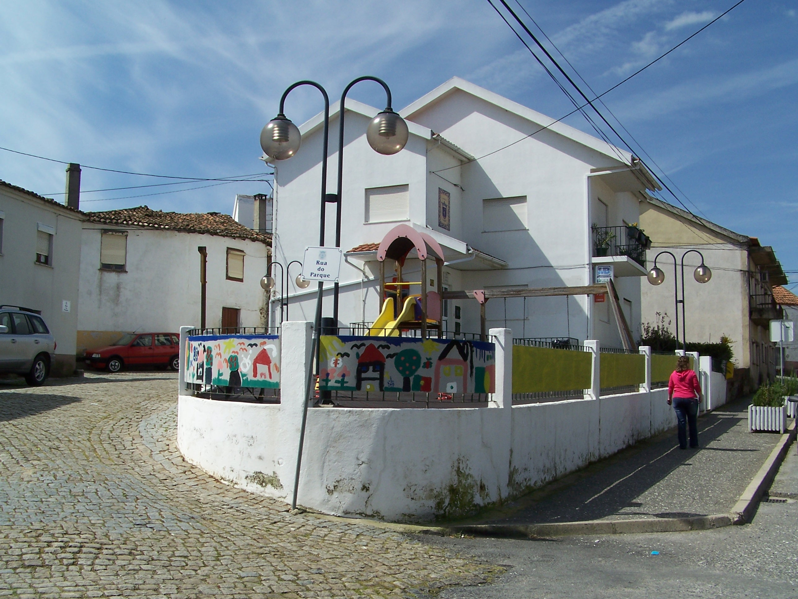 Dominguizo, Parque_infantil_e_edificio_da_Junta_de_Freguesia